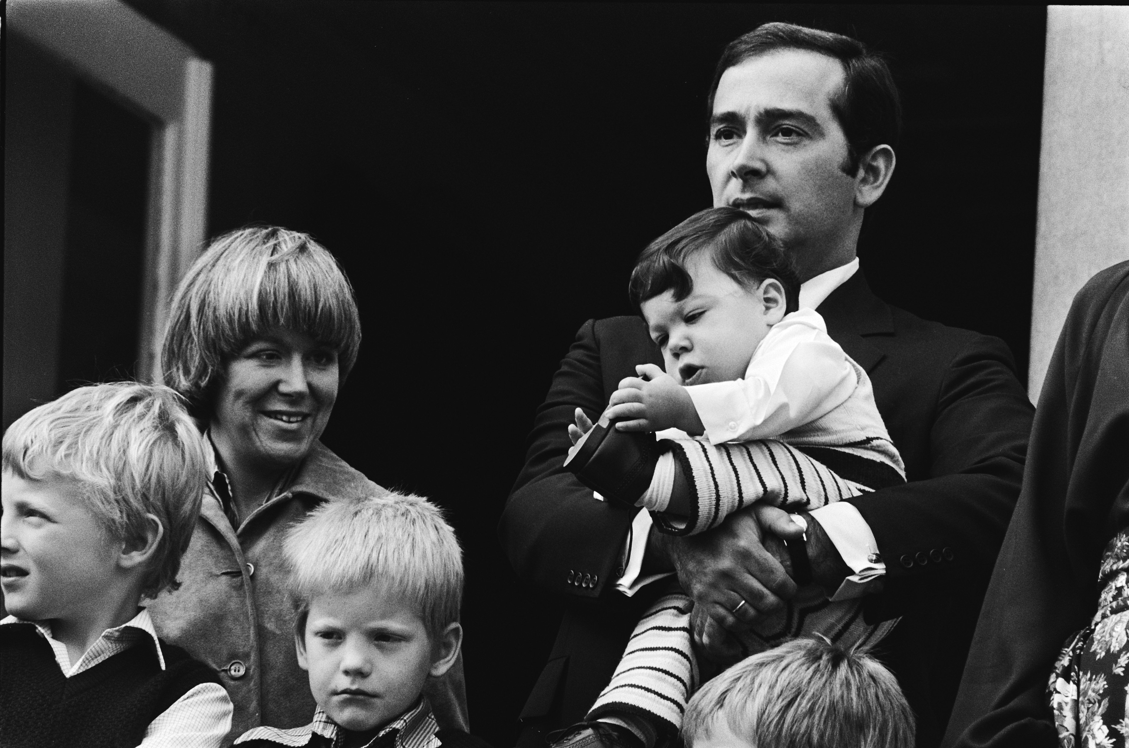 Collectie / Archief : Fotocollectie Anefo Reportage / Serie : [ onbekend ] Beschrijving : Defile Soestdijk 78; Prinses Christina en Jorge Guillermo met zoon Bernardo (close) Datum : 1 mei 1978 Locatie : Soestdijk, Utrecht Trefwoorden : Defiles Persoonsnaam : Bernardo, Christina, prinses, Guillermo, Jorge Fotograaf : Verhoeff, Bert / Anefo Auteursrechthebbende : Nationaal Archief Materiaalsoort : Negatief (zwart/wit) Nummer archiefinventaris : bekijk toegang 2.24.01.05 Bestanddeelnummer : 929-6981